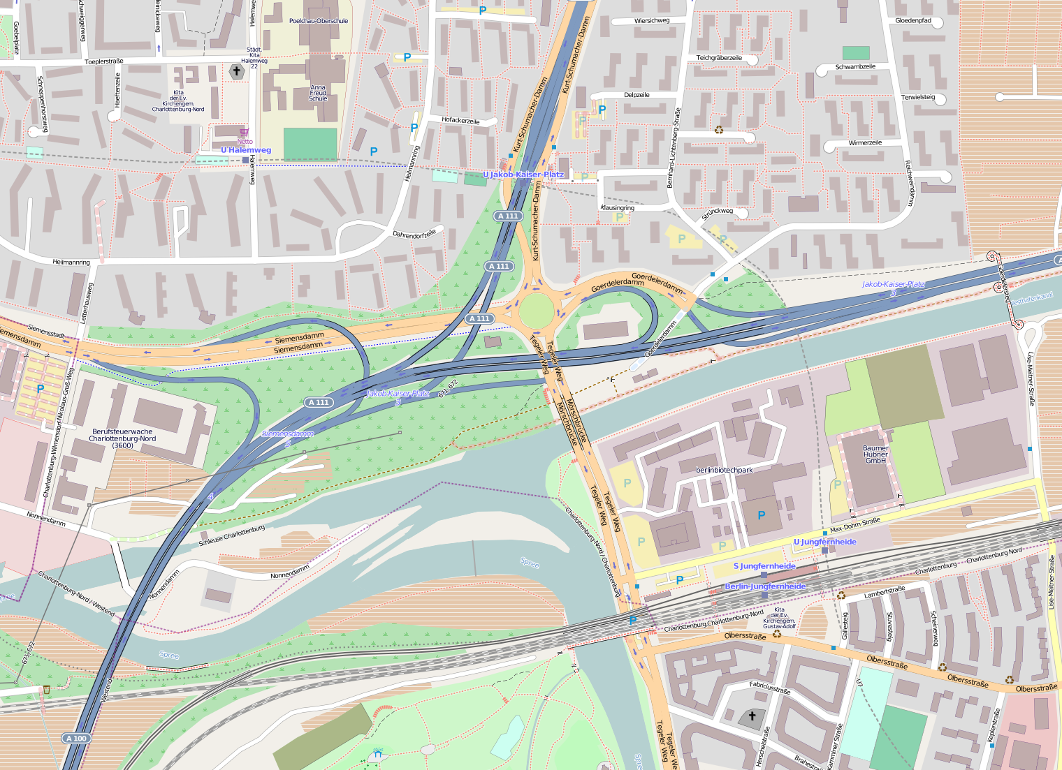 Lage des Autobahndreiecks Charlottenburg (A100/A111) in Berlin.